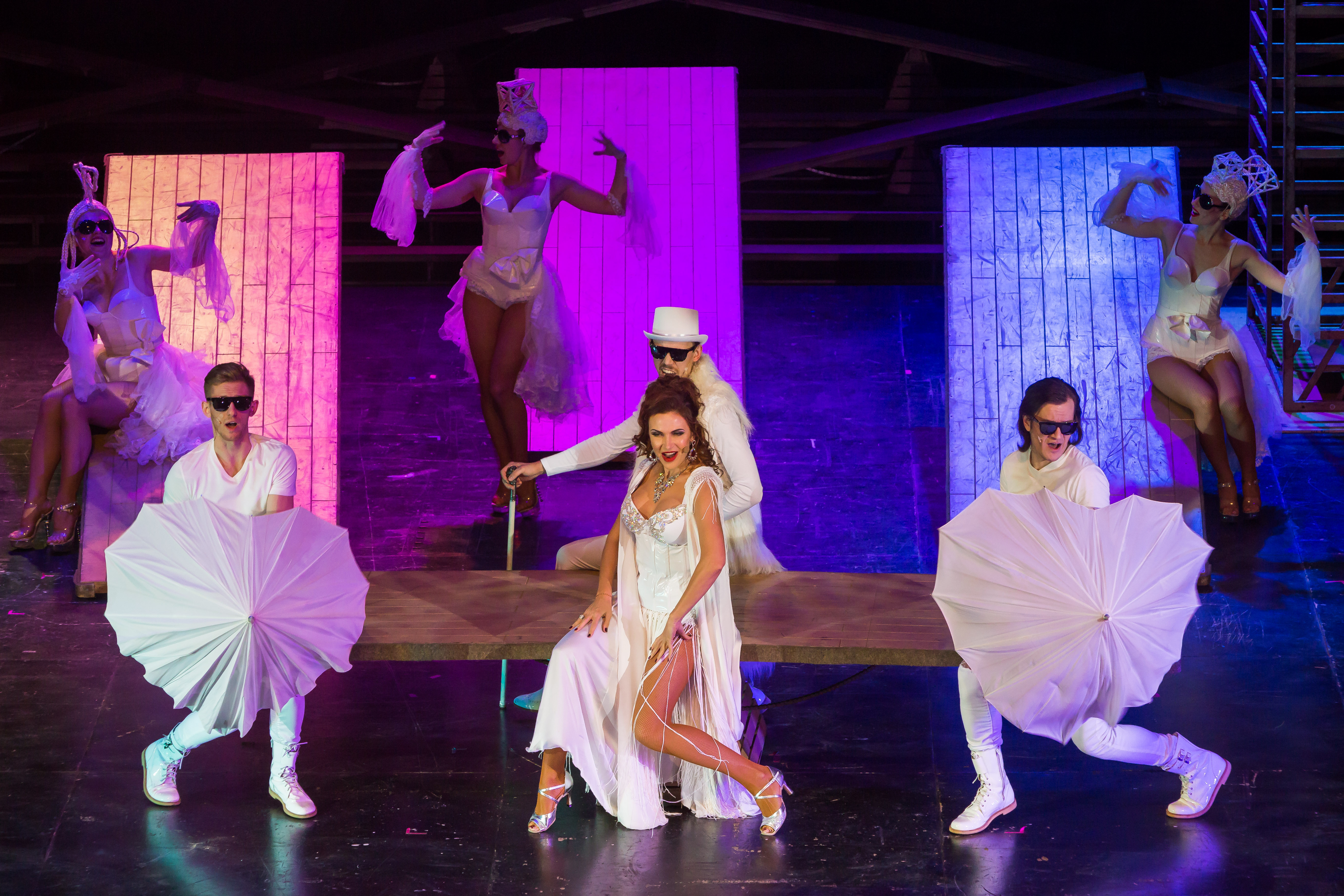 Сцена из мюзикла "Алые паруса" (Хозяйка "Маяка" – Эвелина Блёданс)